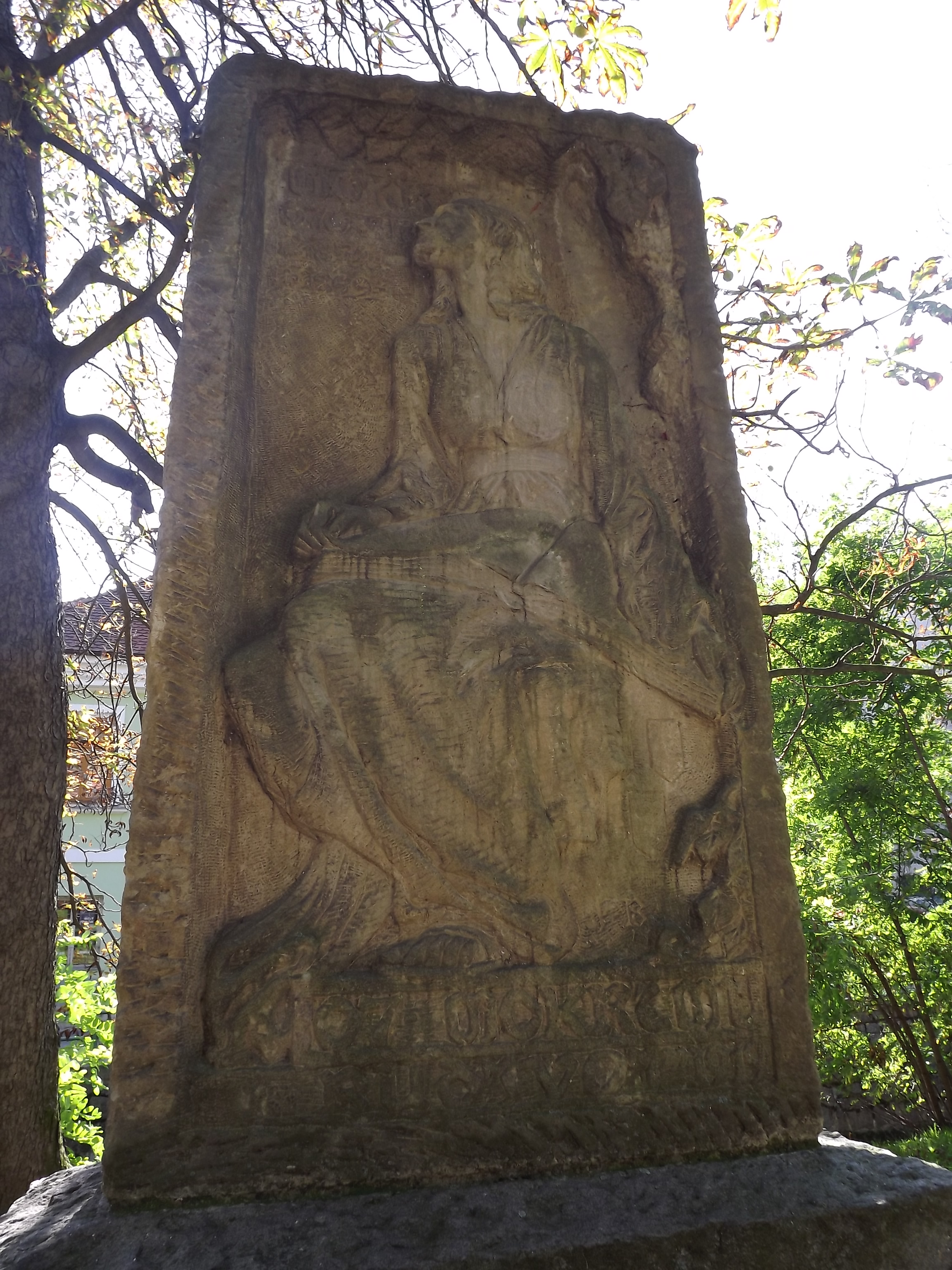 Pomník Otokara Mokrého, Na Sadech, České Budějovice